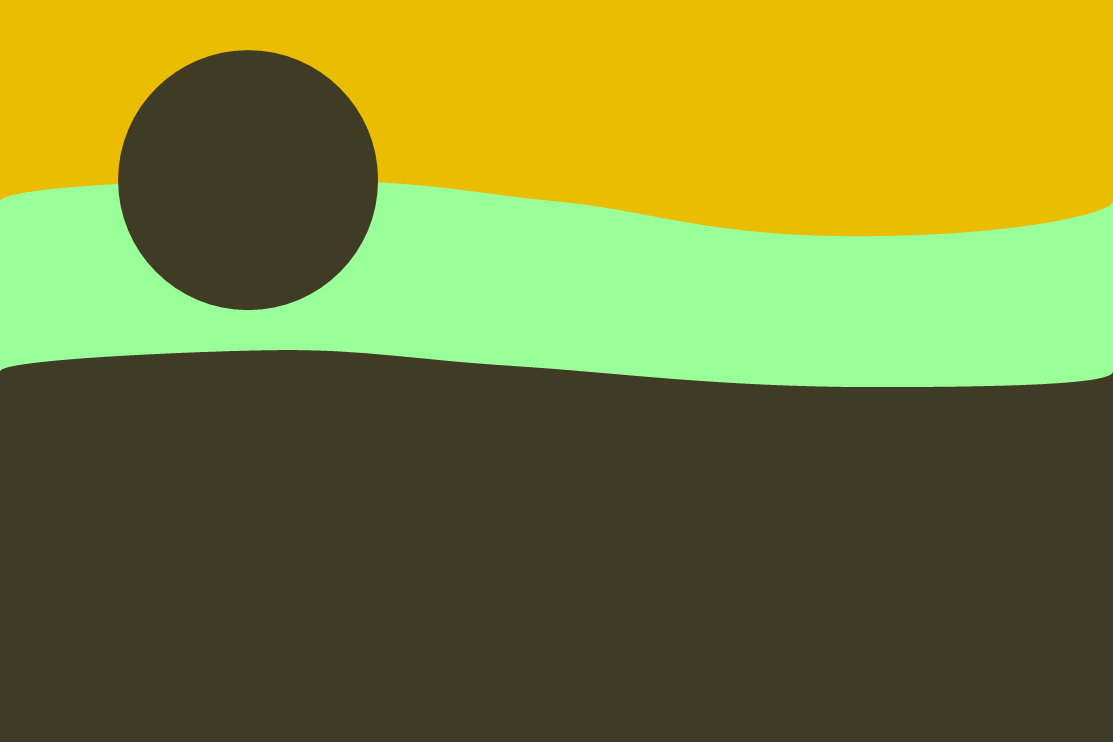 Bandera Las Lomas